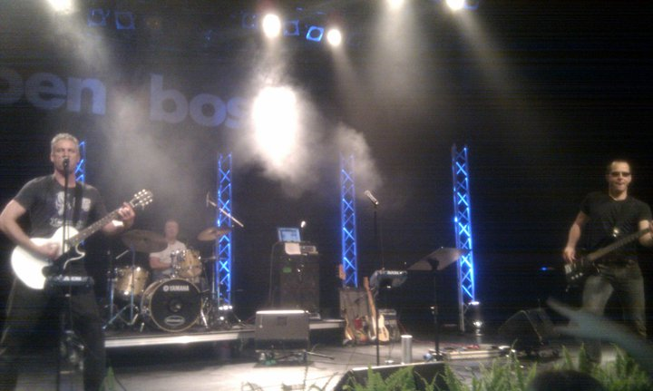 Free to Choose spiller 'Partiets Bosser (har ingen nosser)' på Det Konservative Folkepartis landsråd i Aalborg, 2010